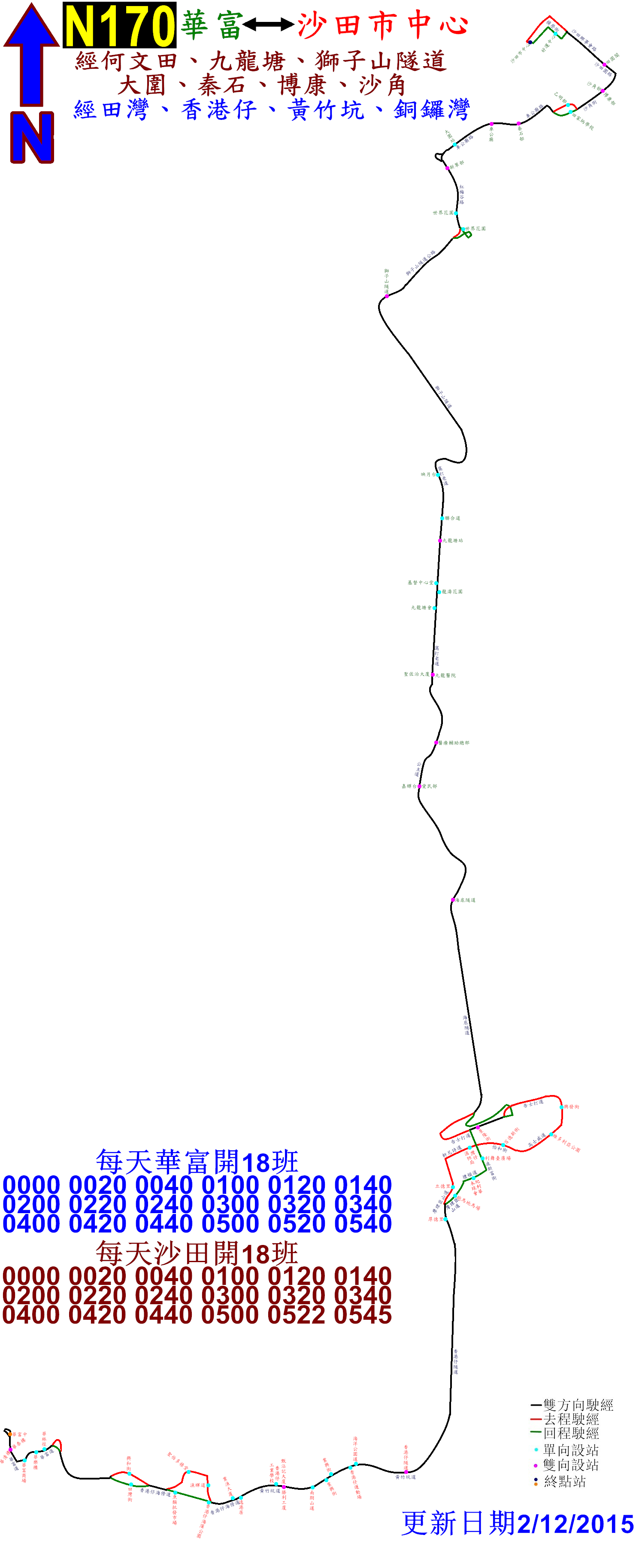 中文（香港）: 過海隧巴N170線的走線圖